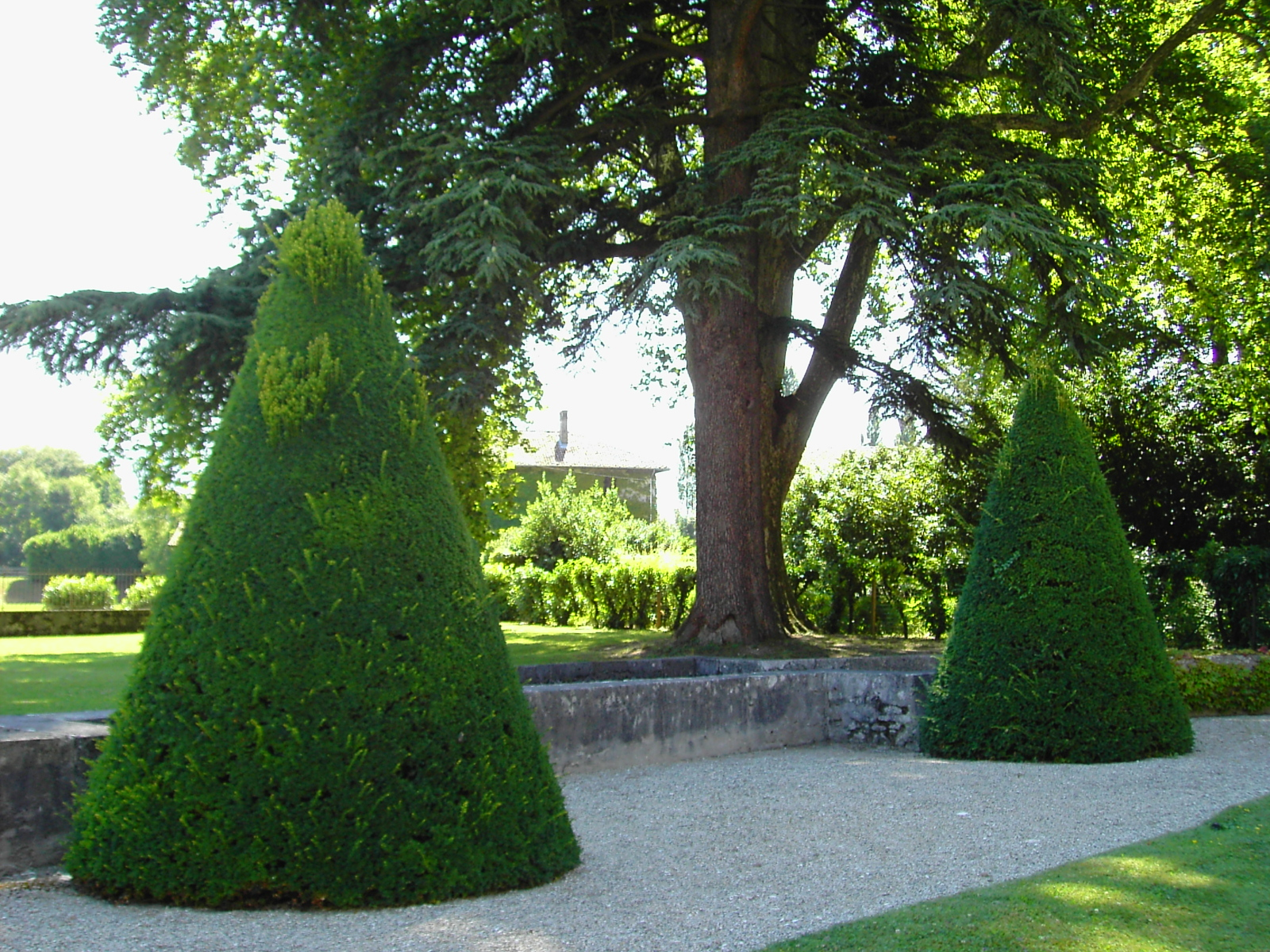 Château de Sassenage XVII s. , près de Grenoble.